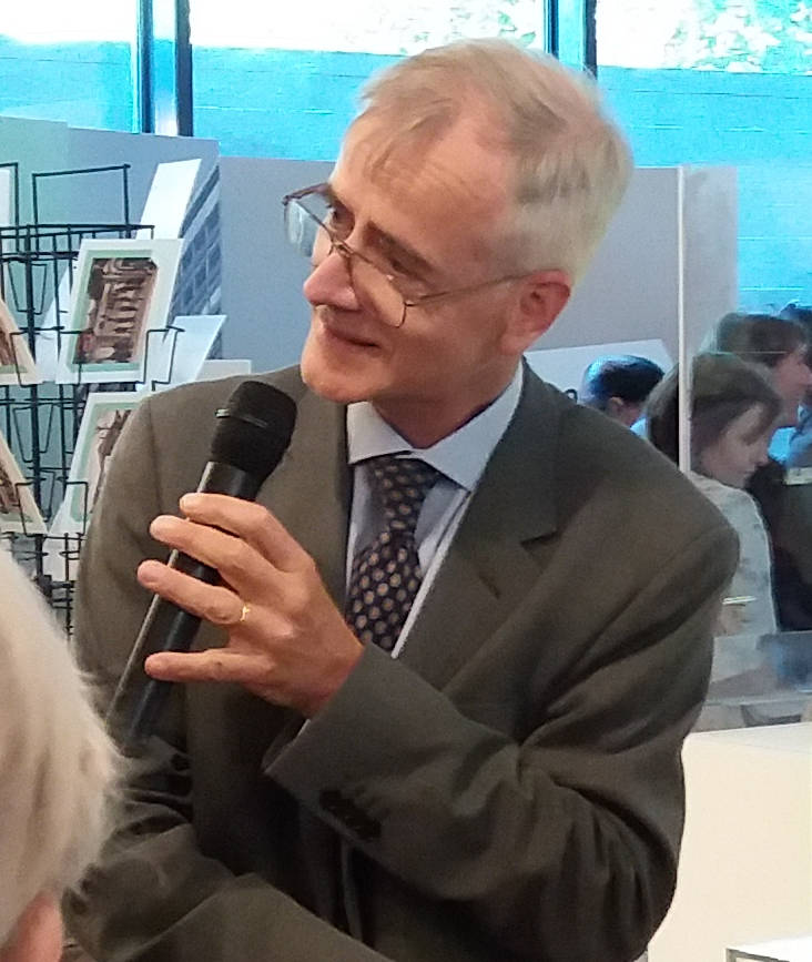 Bruno Galland lors du vernissage de l'exposition La Part-Dieu 800 ans d'histoire. Personality rights warningAlthough this work is freely licensed or in the public domain, the person(s) shown may have rights that legally restrict certain re-uses unless those depicted consent to such uses. In these cases, a model release or other evidence of consent could protect you from infringement claims.